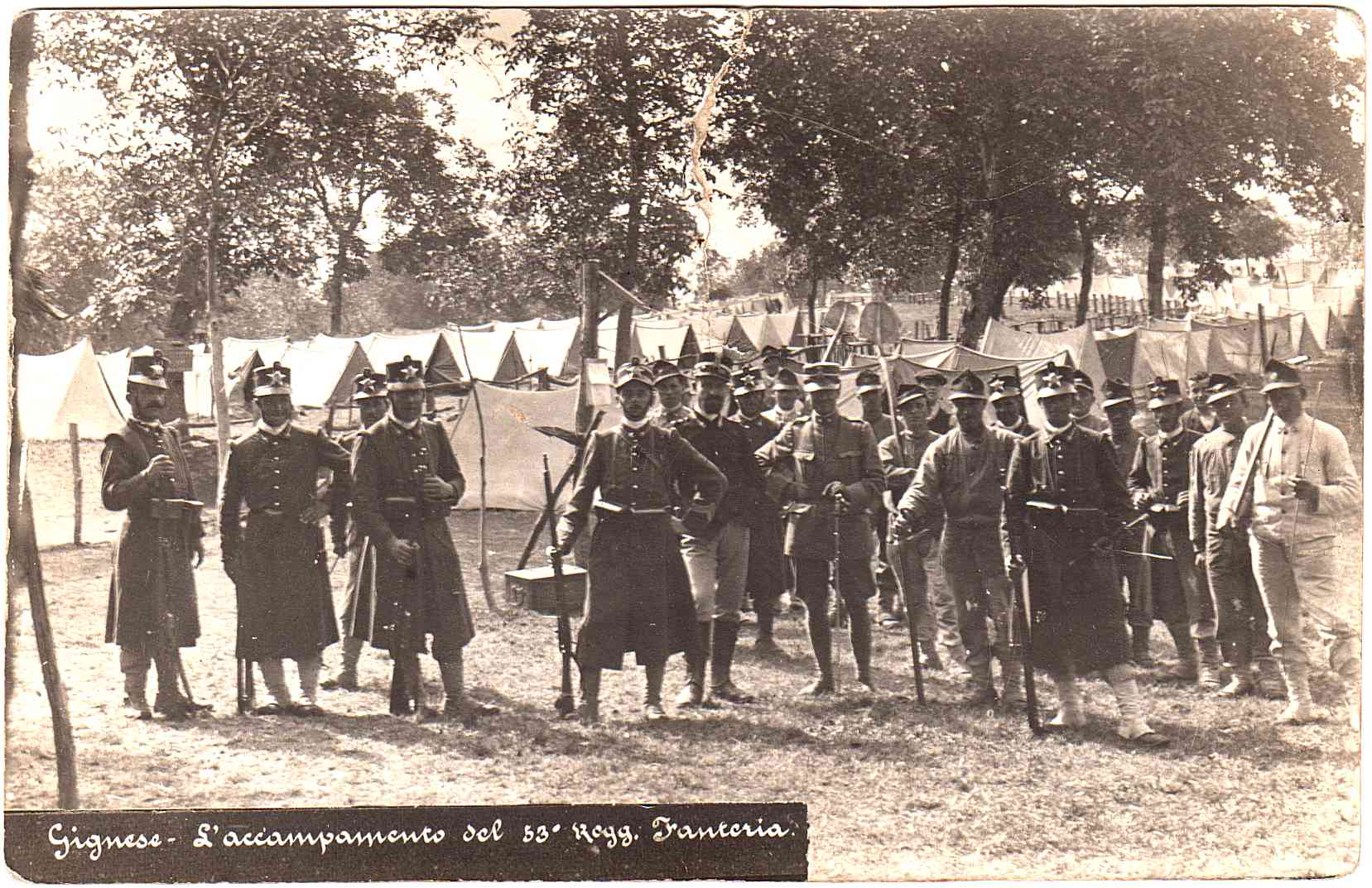 VB (Verbano-Cusio-Ossola) - Gignese l'accampamento del 53° Reggimento Fanteria